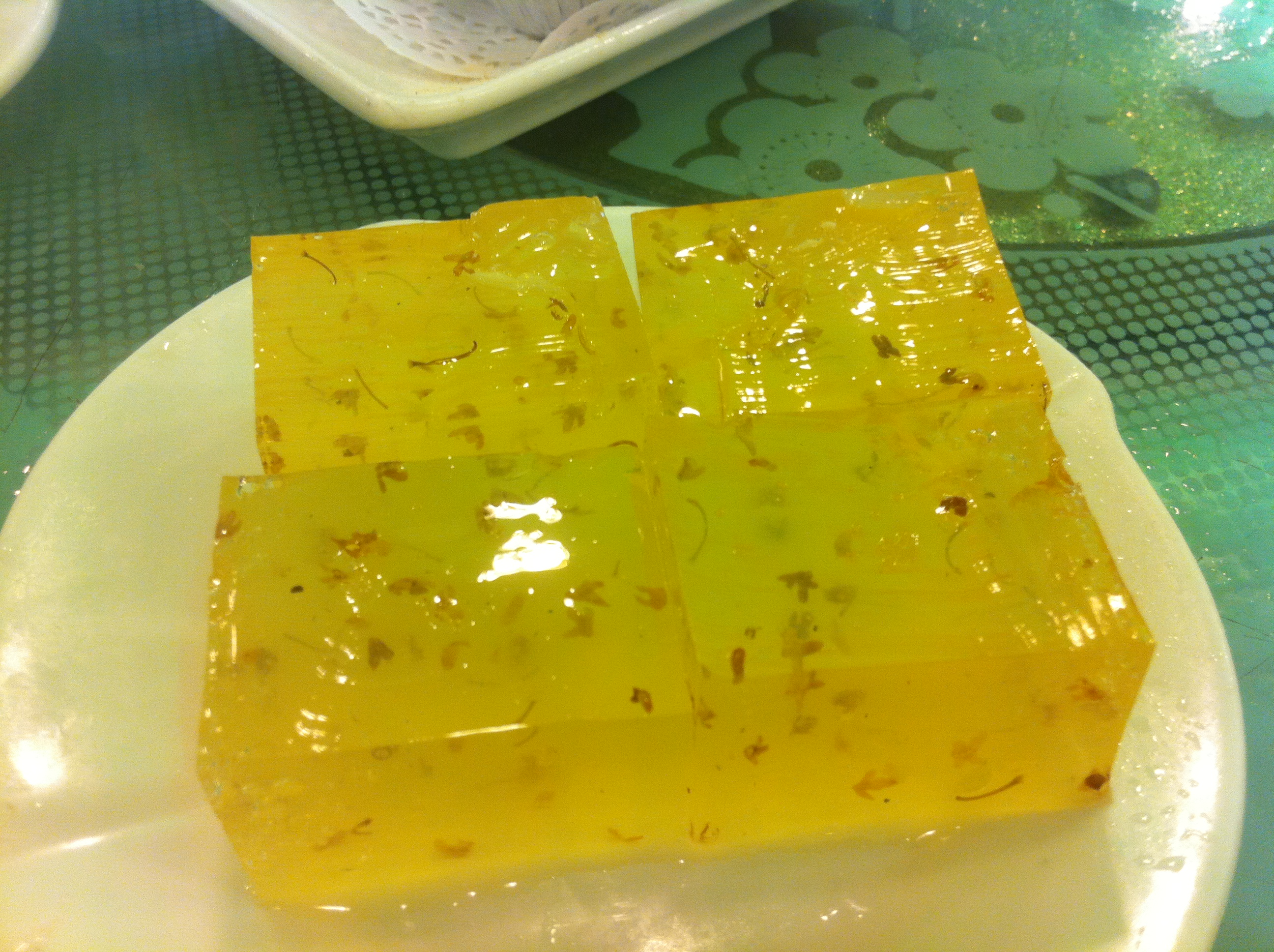 中文（香港）: 中式食品 甜品 桂花榚